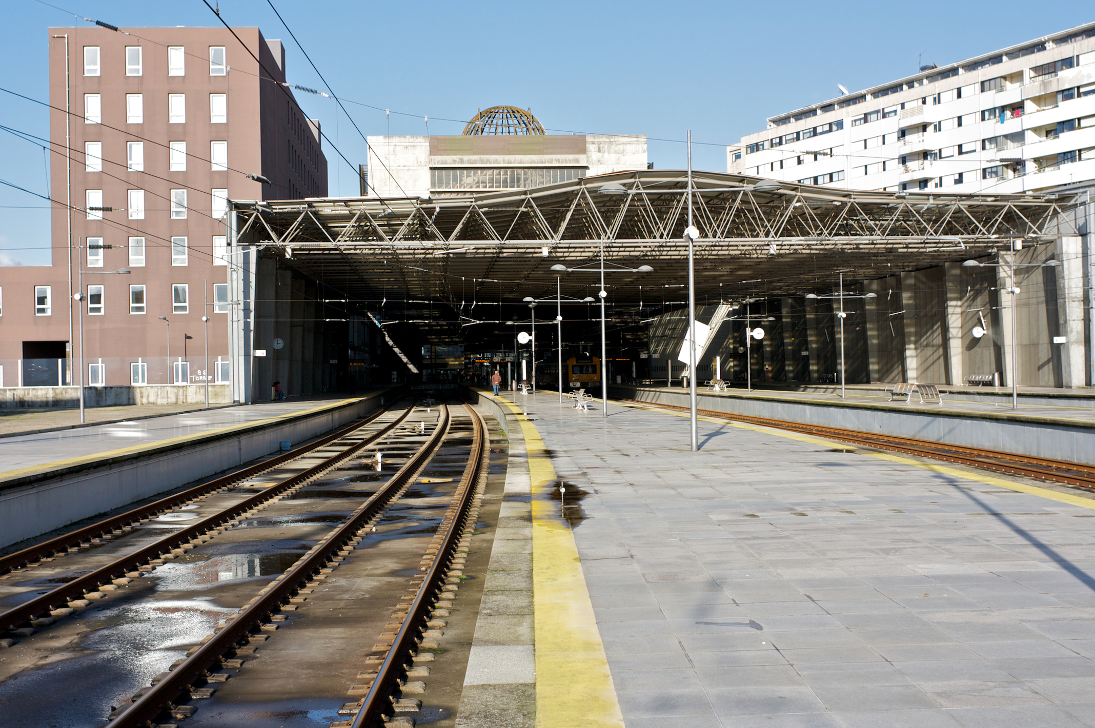 Tipo: ES Estação Satélite Local: Braga Ramal de Braga, PK 53 Data e hora: 17 de Dezembro de 2009 14h57